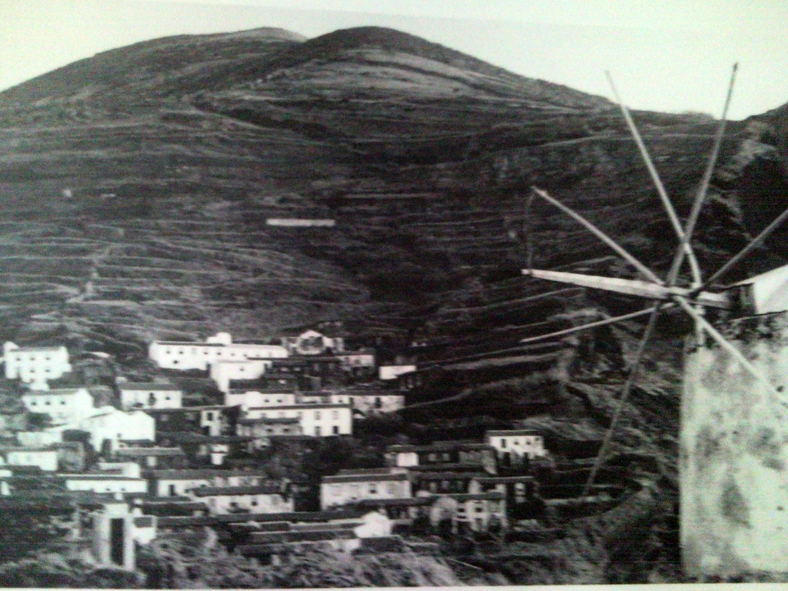 Corvo, início do Séc, XX, paisagem, Arquivo de Villa Maria, Angra do Heroísmo, ilha Terceira, Açores